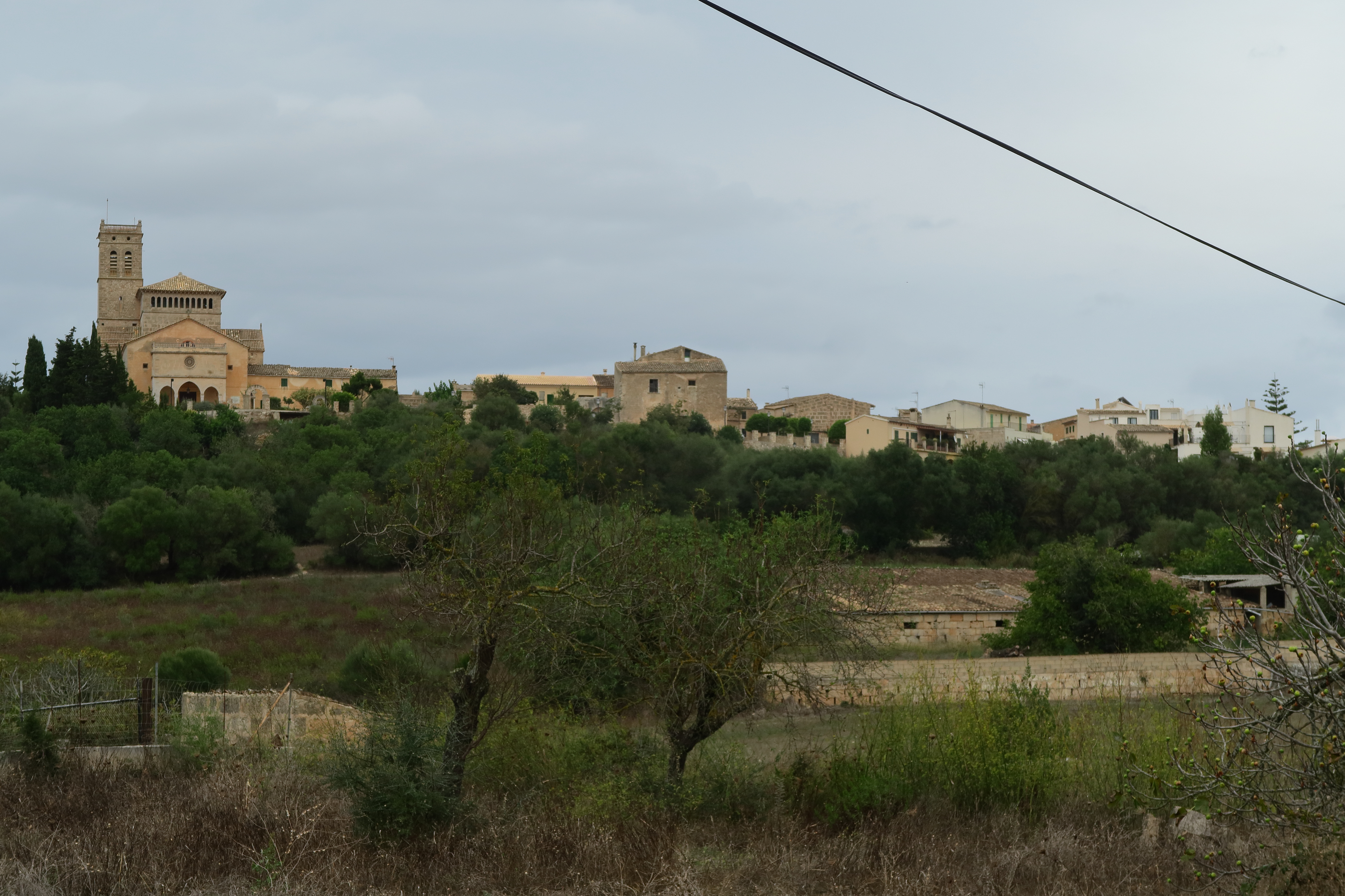 Ariany, desde Ma-3341